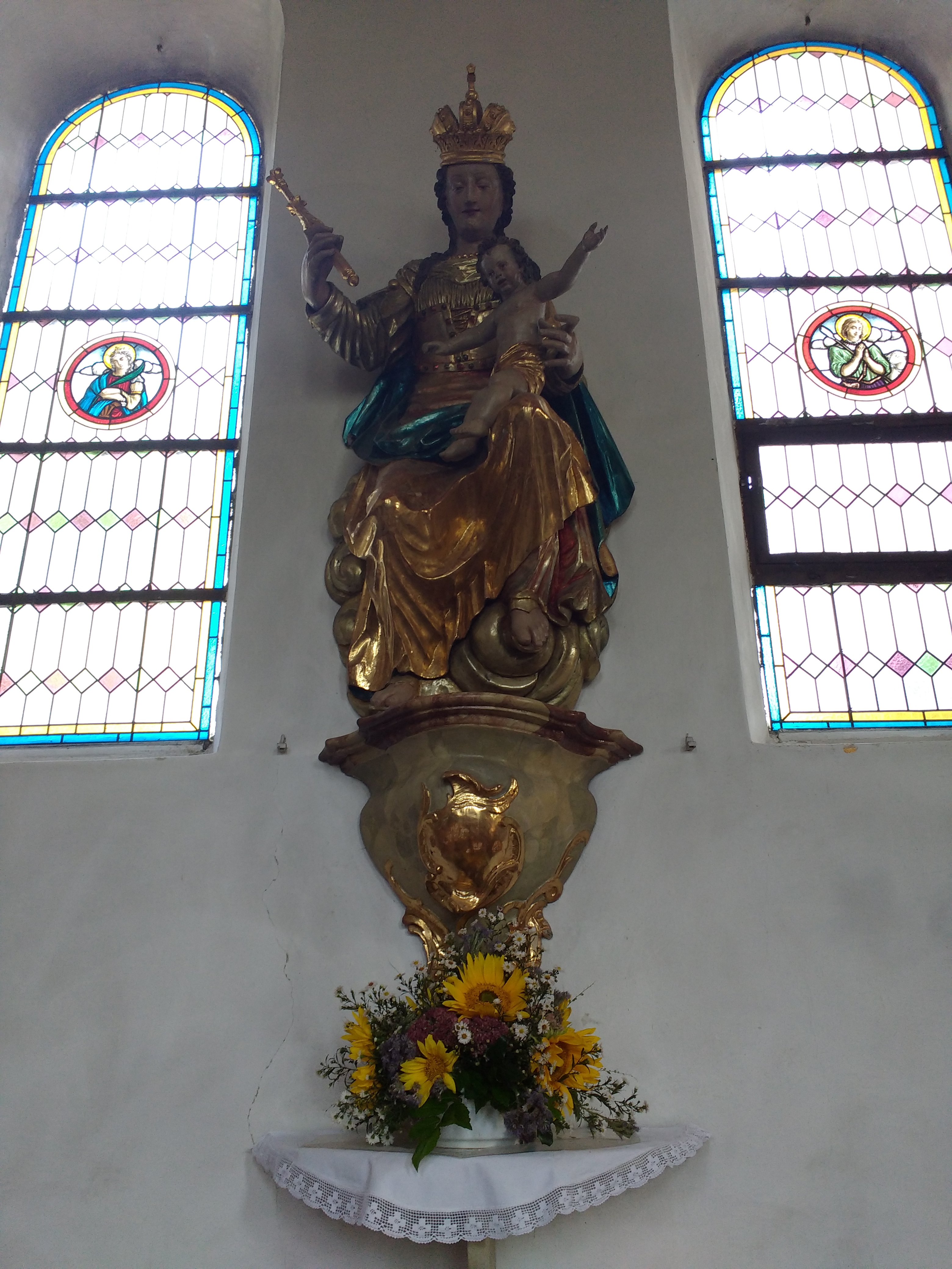 Katholische Pfarrkirche St Laurentius im Freisinger Stadtteil Haindlfing. Der Kirchenbau steht unter Denkmalschutz (Aktenzeichen D-1-78-124-260).This is a photograph of an architectural monument.